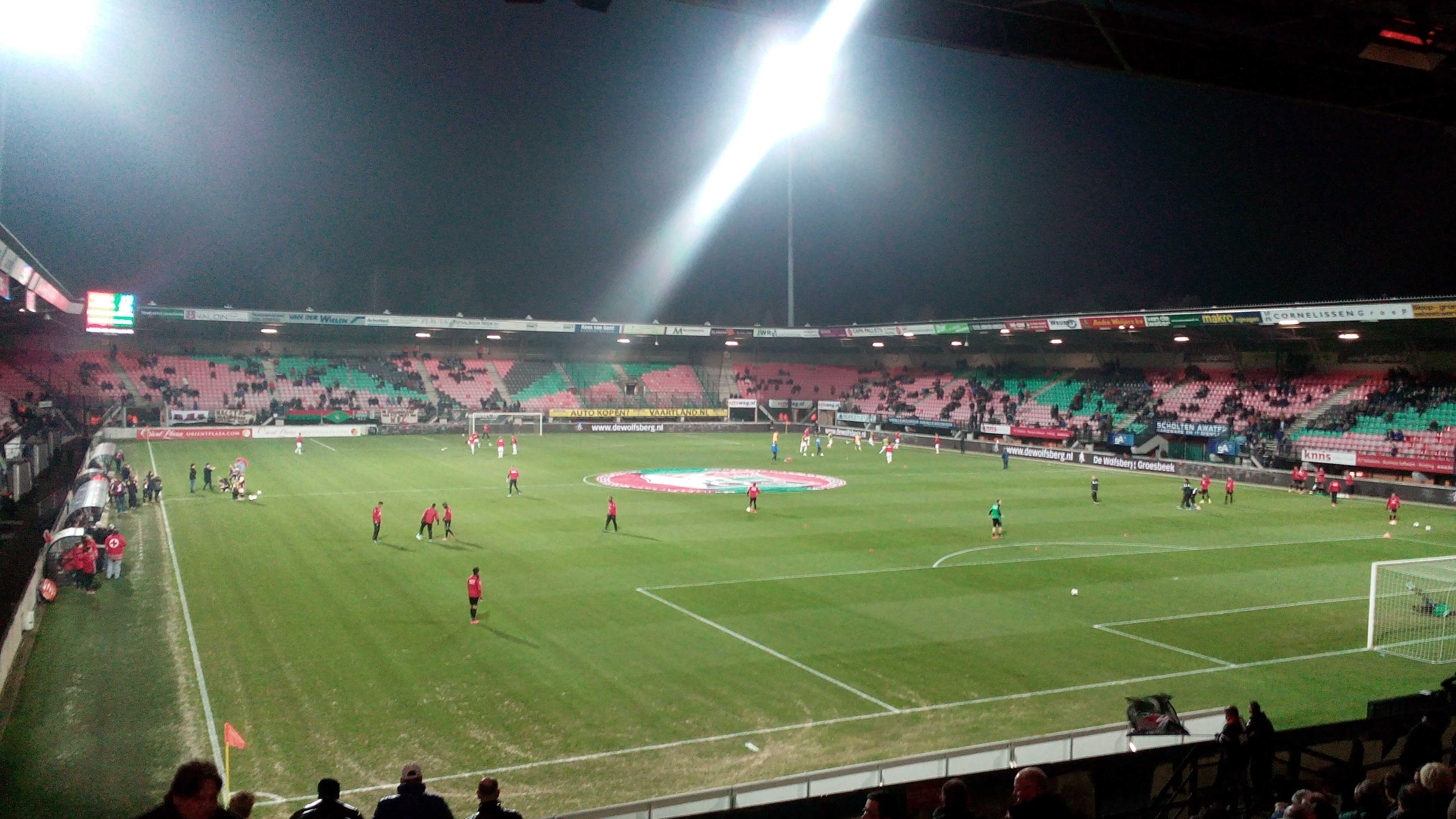 Stadion de Goffert by night